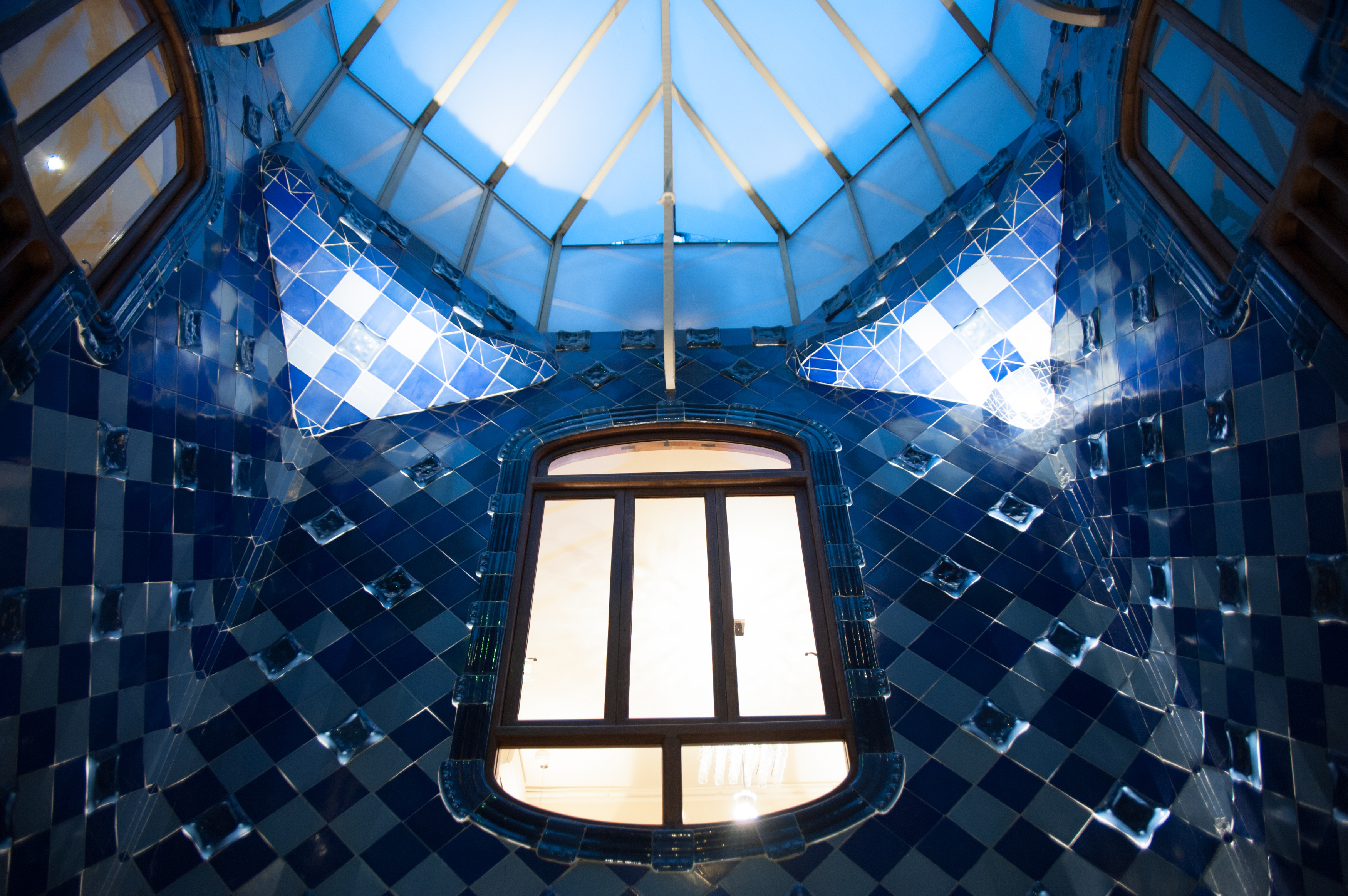 Casa Batlló (Antoni Gaudi) (atrium,close up), 43, Passeig de Gràcia, Eixample, Barcelona, Catalonia, Spain.